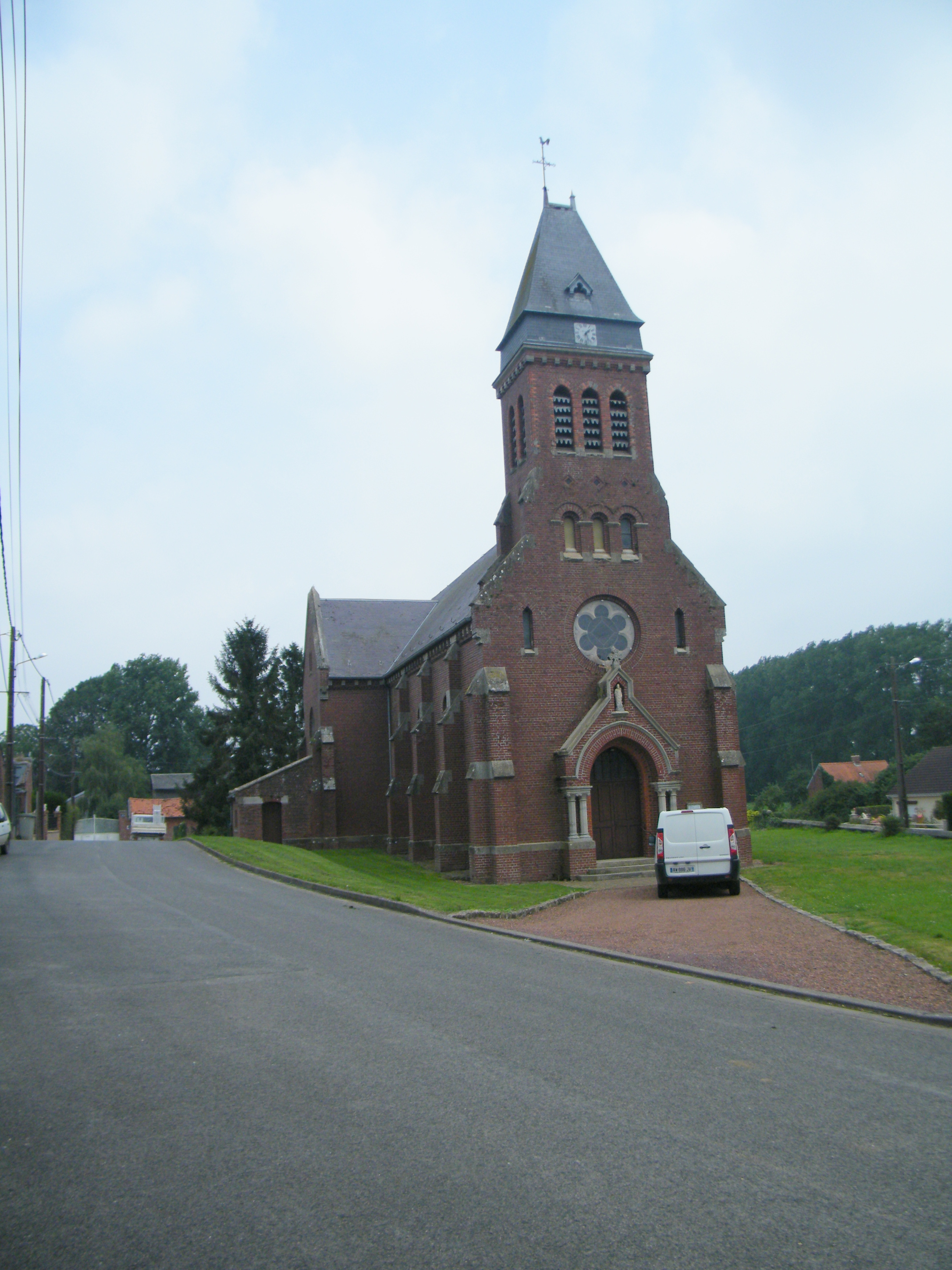 Eglise.